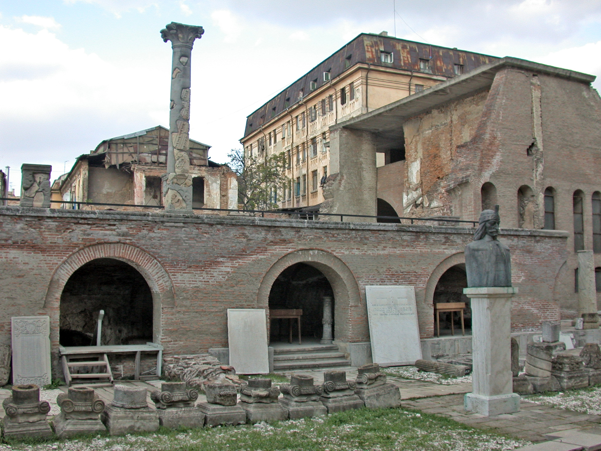 Romania, Bucarest, Curtea Veche (residenza di Vlad III l'Impalatore